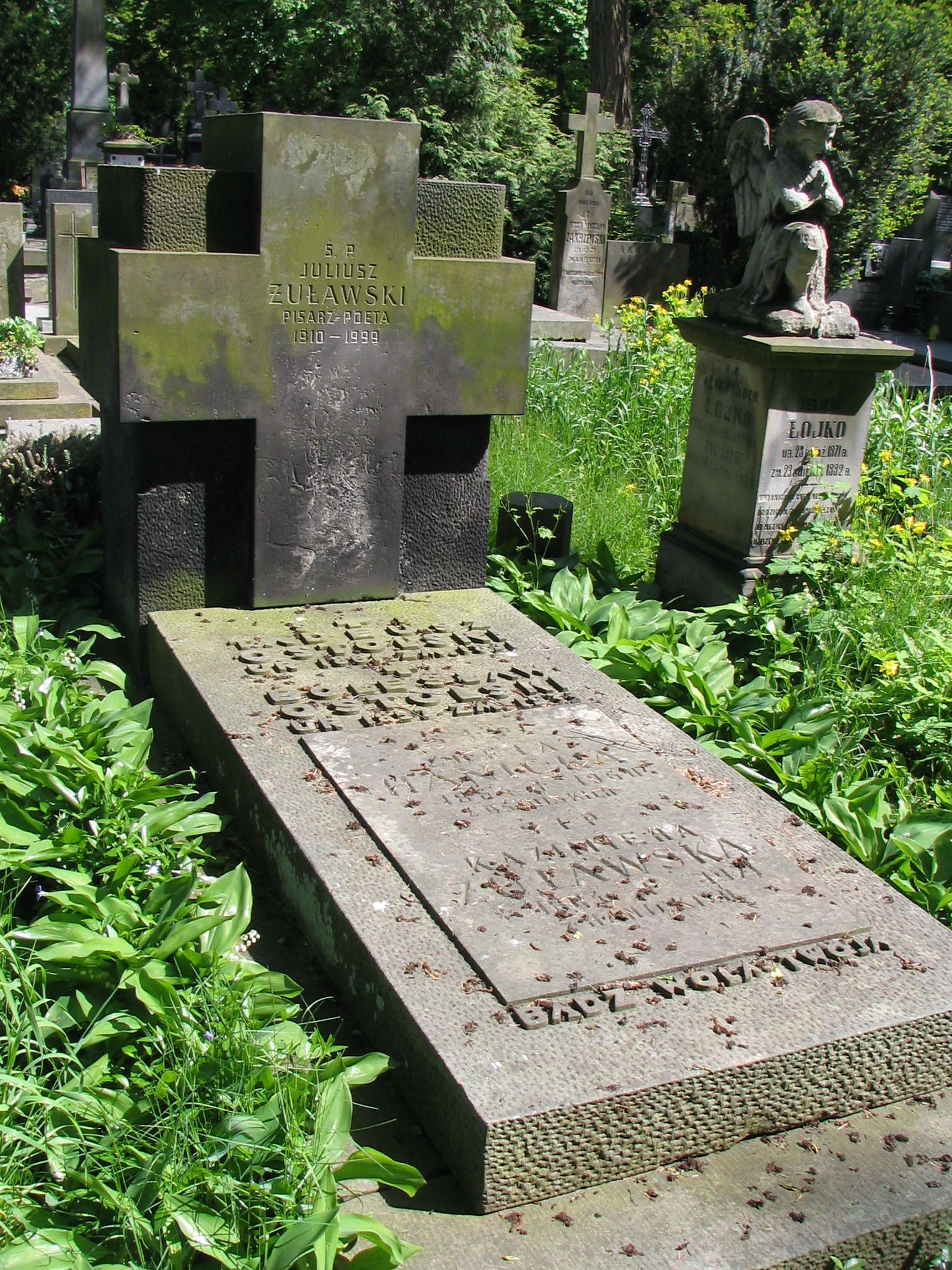 Nagrobek Juliusza Żuławskiego na Cmentarzu Powązkowskim, Warszawa